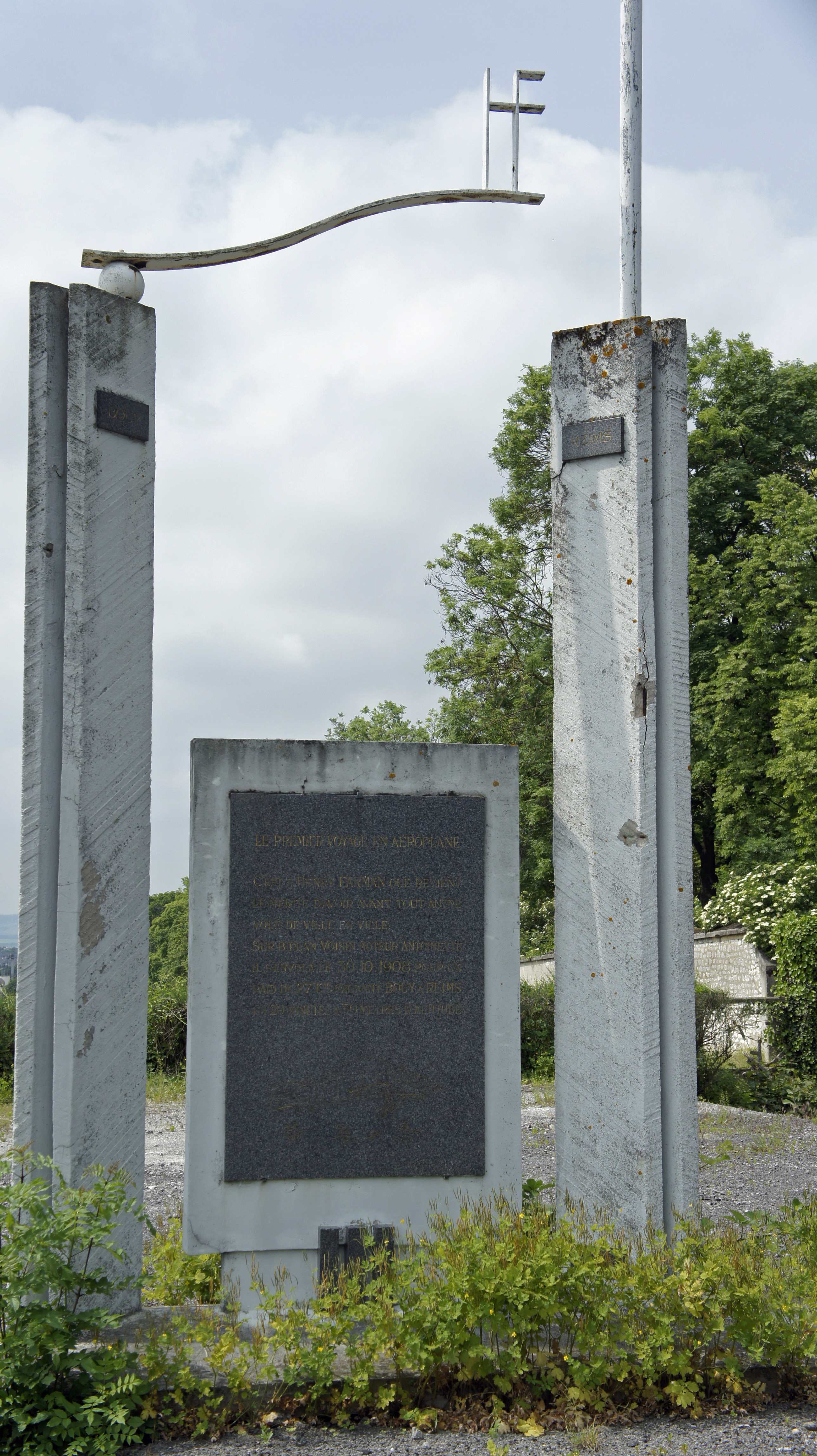 Monument en hommage au premier vol interville réalisé entre Reims et Bouy. Il est construit sur le lieu de l'aterrissage à Reims.